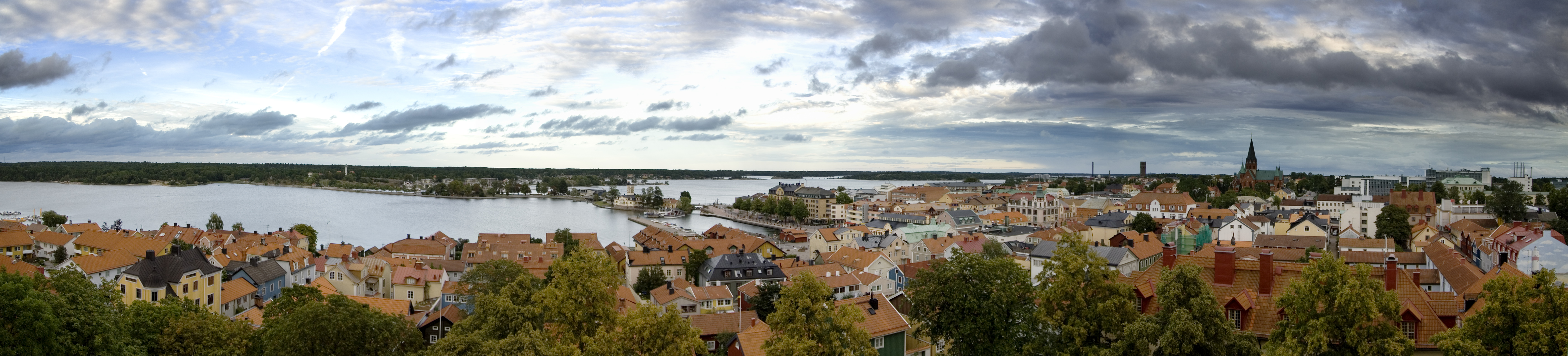 Ett panorama över Västervik från taket på St. Gertruds Kyrka